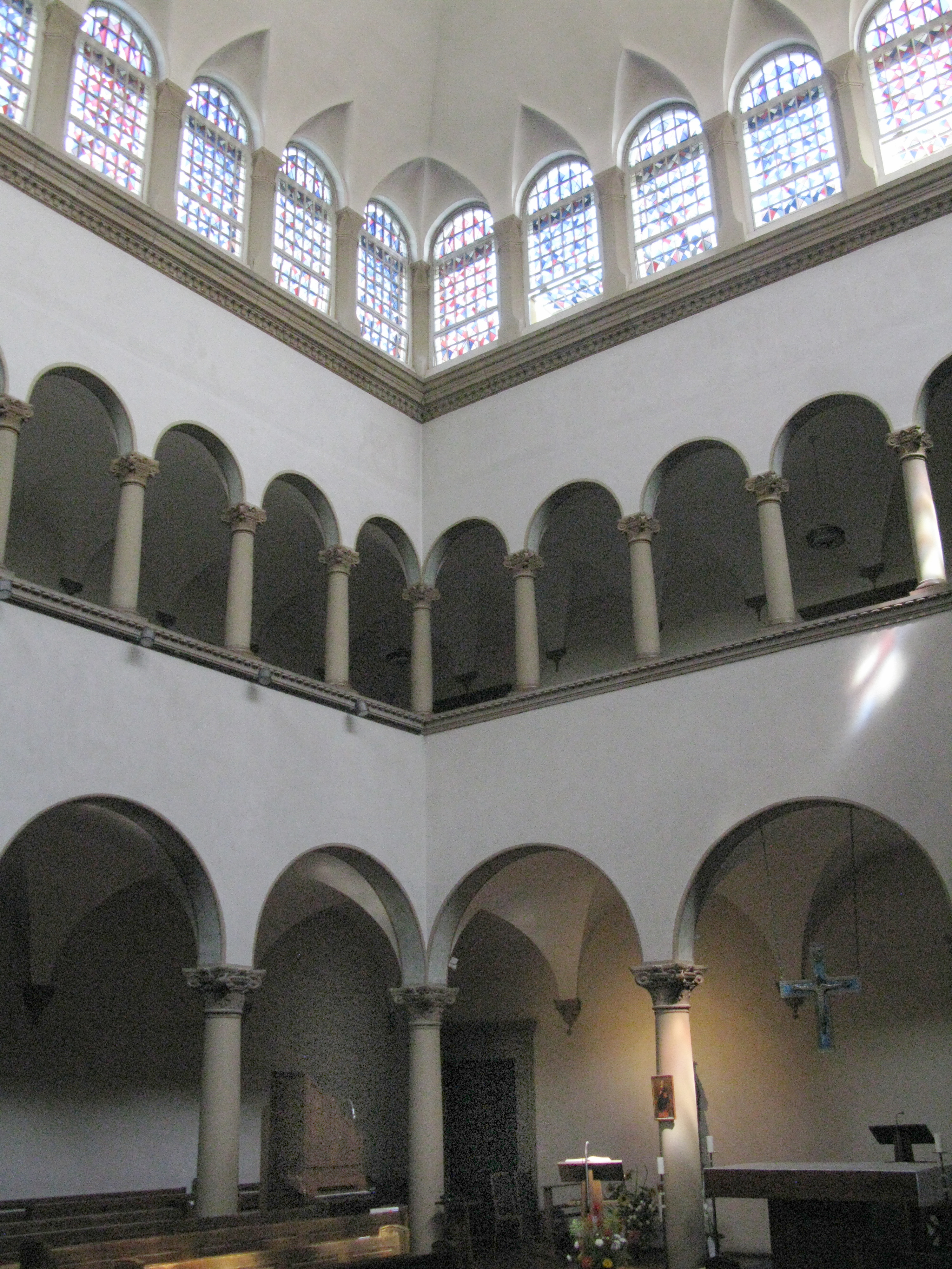 Oratorium im Atrium des Klosters St. Lioba in Freiburg-Günterstal